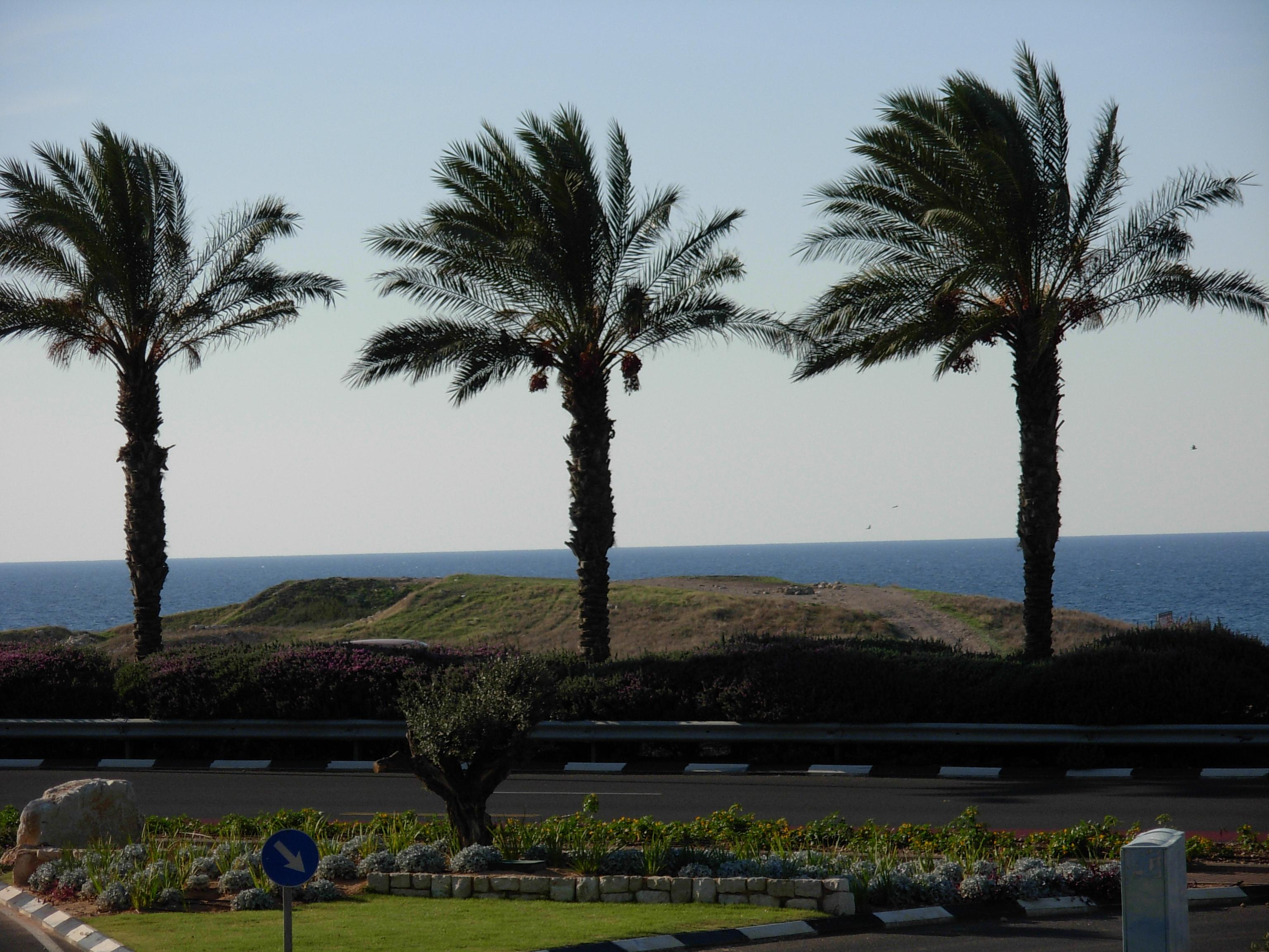 Tel Shikmona